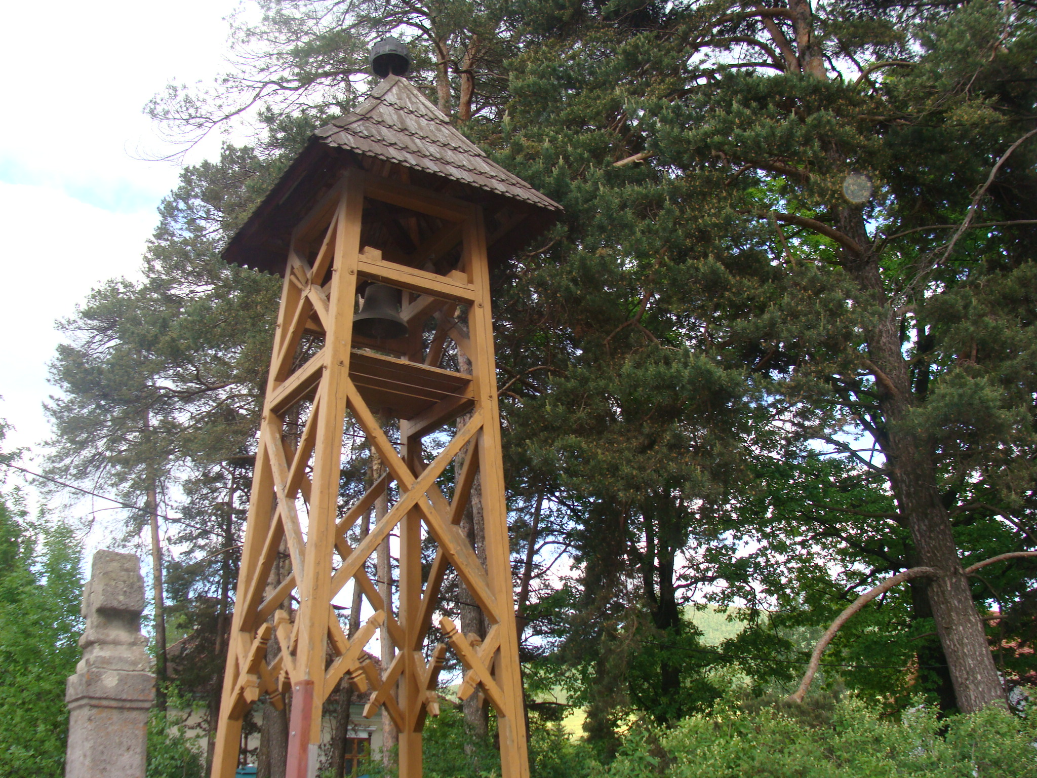 Csíksomlyó kezdetét jelző harangláb Hargita megyében, Romániában